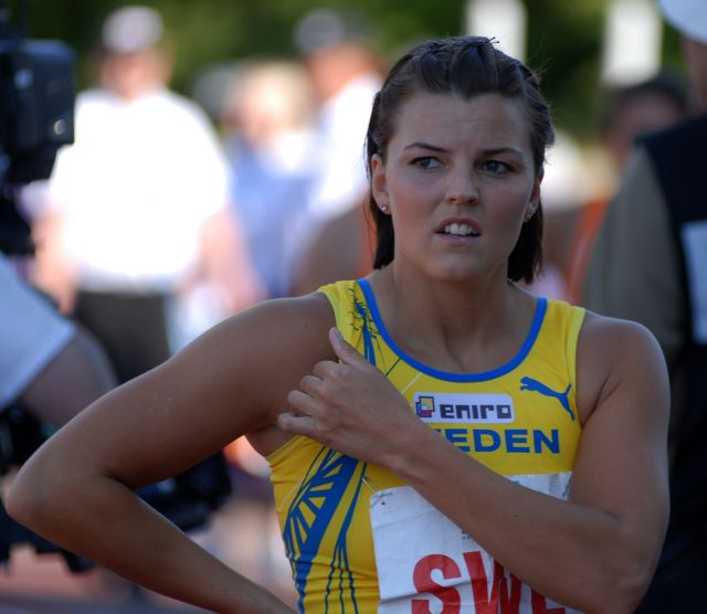 Jenny Kallur during Europacup 2007